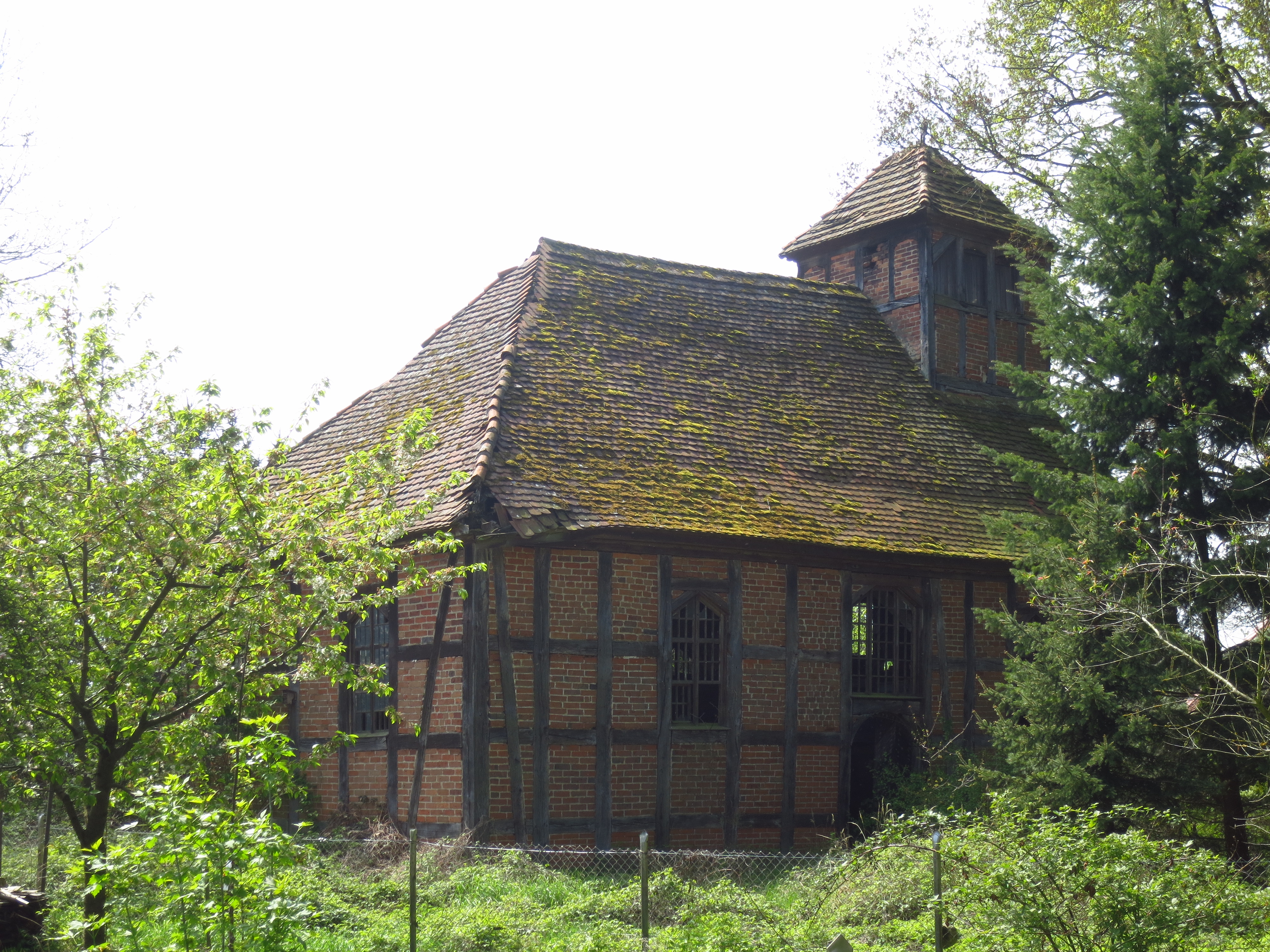 Kirche Losenrade, Eickerhöfe, Baudenkmal. Blick von Nordost.